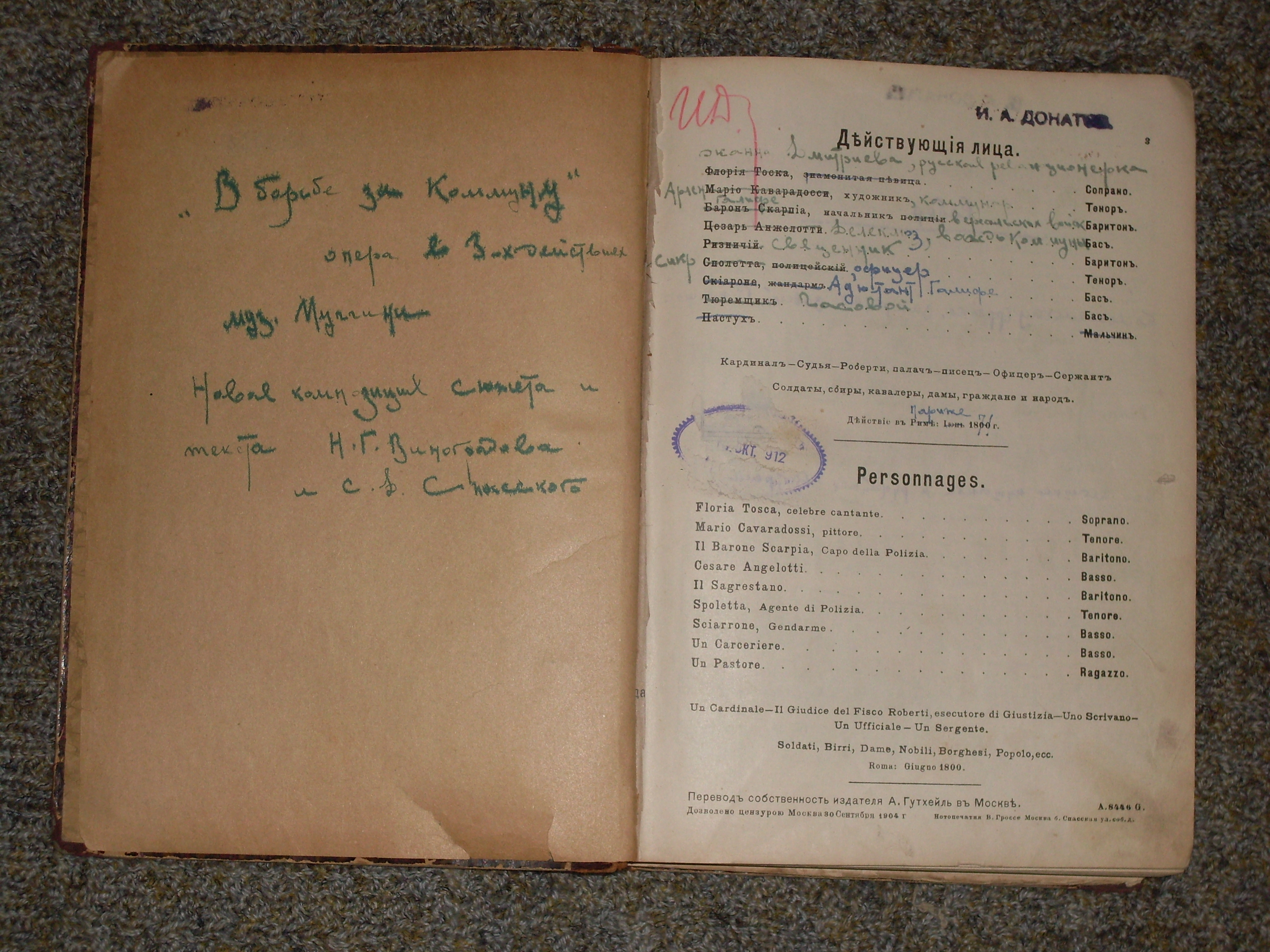 Клавир оперы Дж. Пуччини "Тоска" с новым либретто С.Д.Спасского.